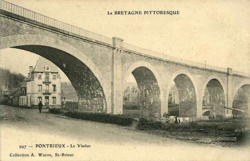 Viaduc Réseau Breton de Pontrieux